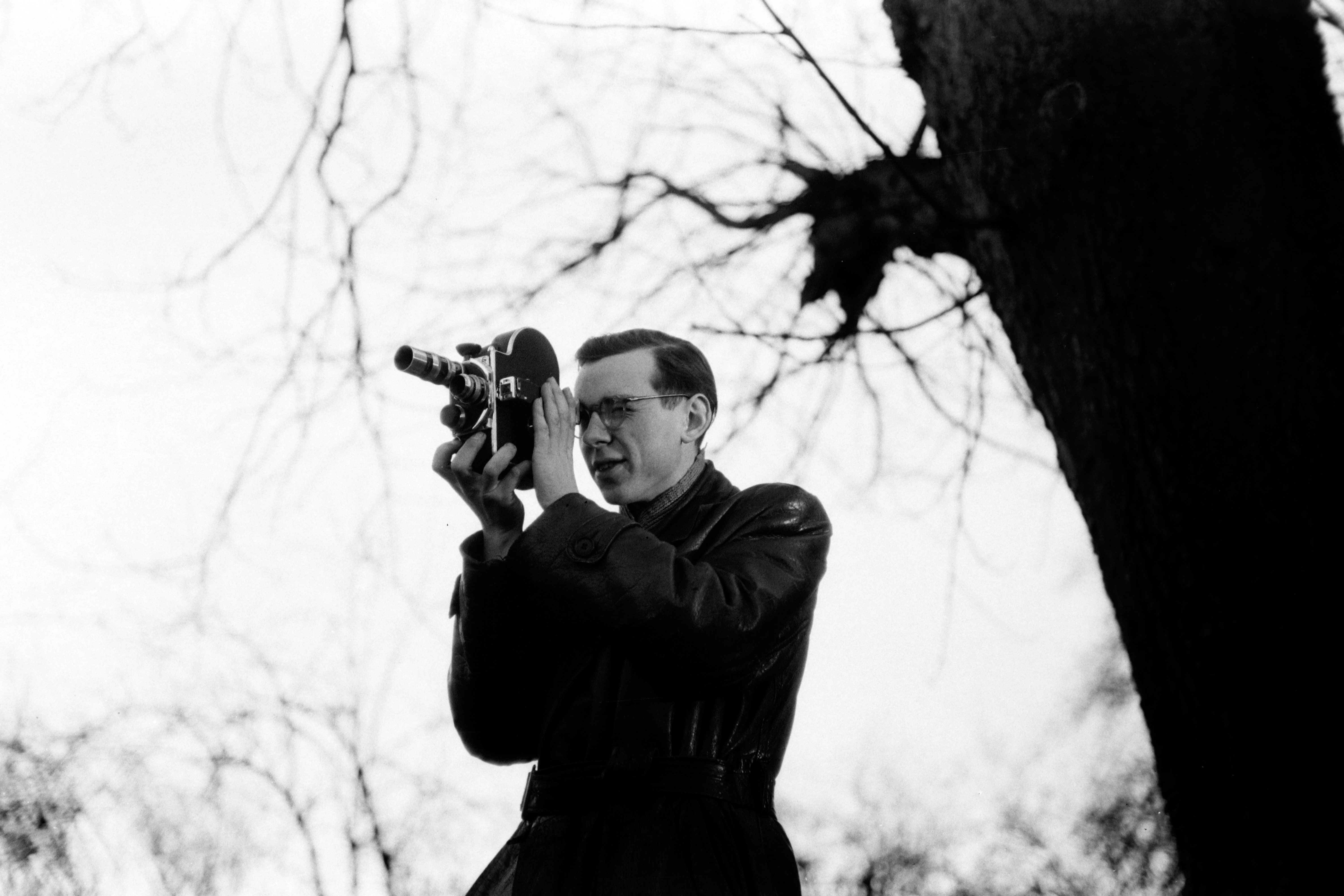 Diese 1949 datierte Aufnahme aus dem Nachlass des Fotografen Gerhard Dierssen zeigt den Fotojournalisten als Selbstbildnis mit Filmkamera in Alvesrode. Das Digitalisat wurde am 27. Juni 2017 erstmals vom Bildarchiv der Region Hannover (Signatur ARH NL Dierssen 0140/0010) der Öffentlichkeit mit der Lizenz CC BY-SA 3.0 zur Verfügung gestellt ...